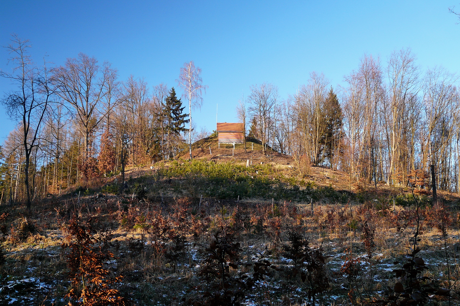 Šibeniční vrch od jihu